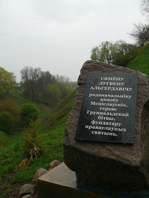 Фото путешествия по Беларуси.